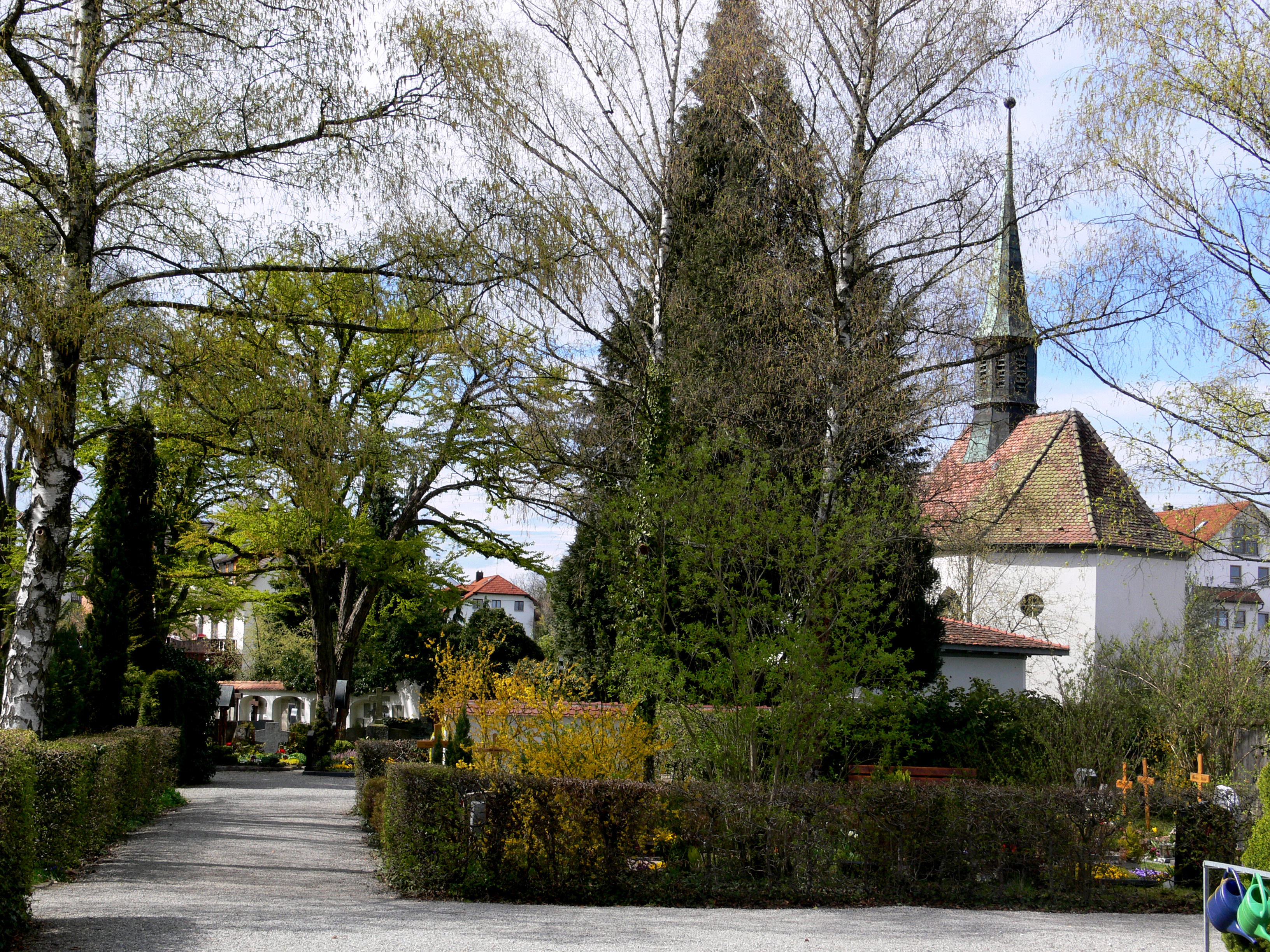 Friedhof in Meersburg (Bodenseekreis)